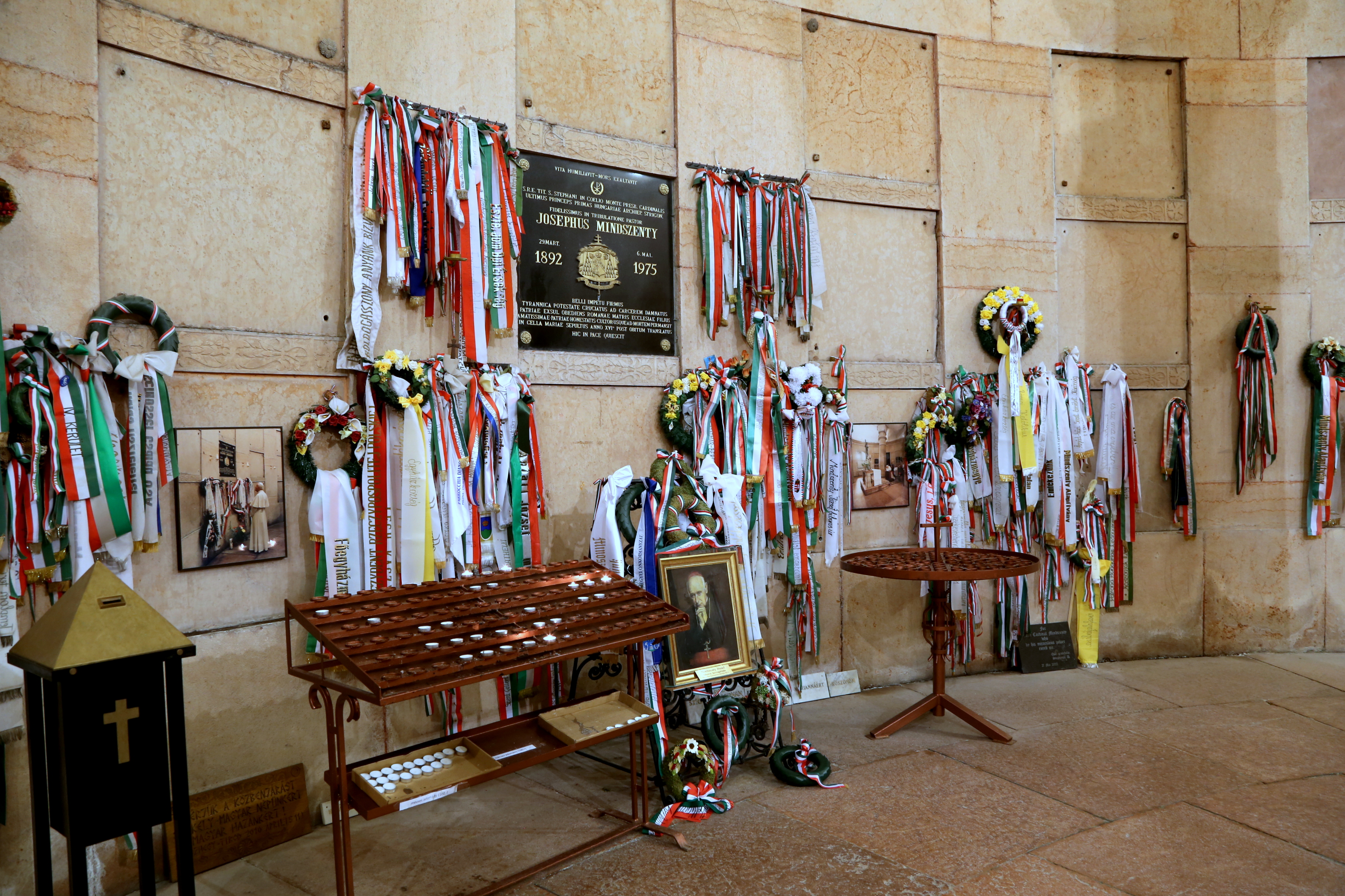 Mindszenty bíboros síremléke az altemplomban